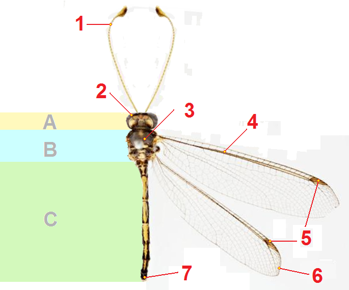 Edited and tagged version of Suhpalacsa barrowensis.jpg. File is slightly rotated, antennapositions are changed.